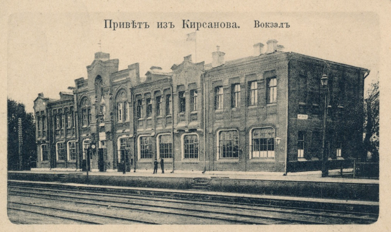 Кирсанов. Железнодорожный вокзал (осн. в 1870-х годах). (фото-открытка нач.XX века).